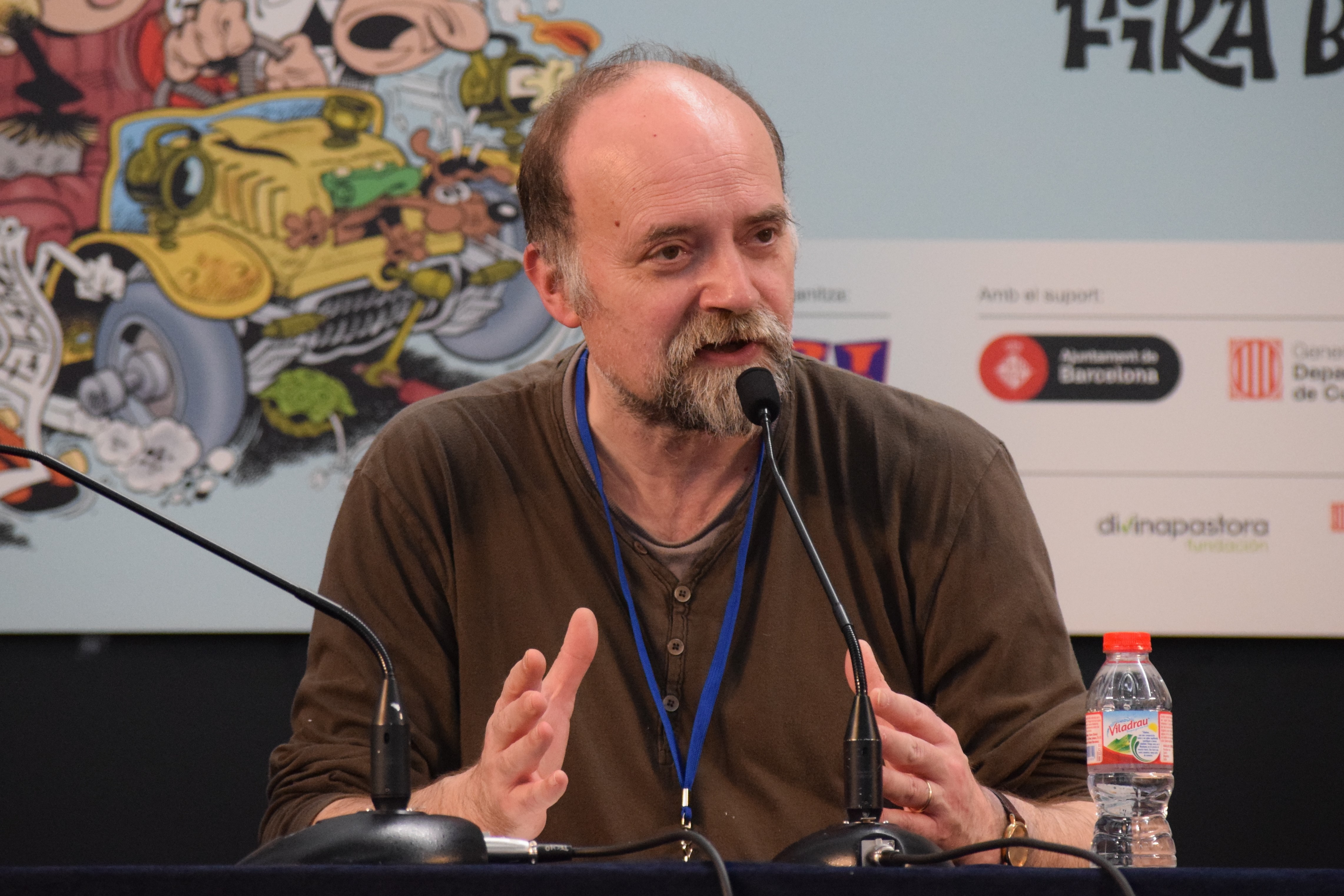 El divulgador de còmics Antoni Guiral parlant a la taula rodona Les últimes sèries de Bruguera durant el 34è Saló Internacional del Còmic de Barcelona (2016).